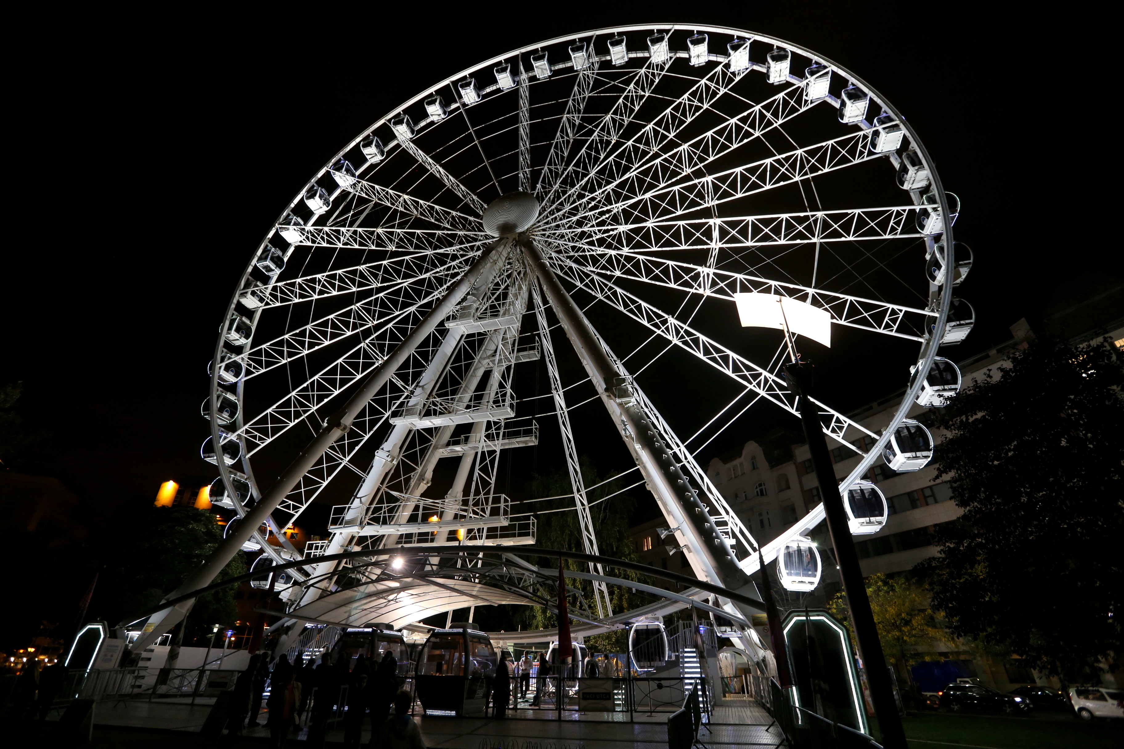 A 65 méter átmérőjű óriáskerék Budapesten, az Erzsébet téren, 2014-ben.